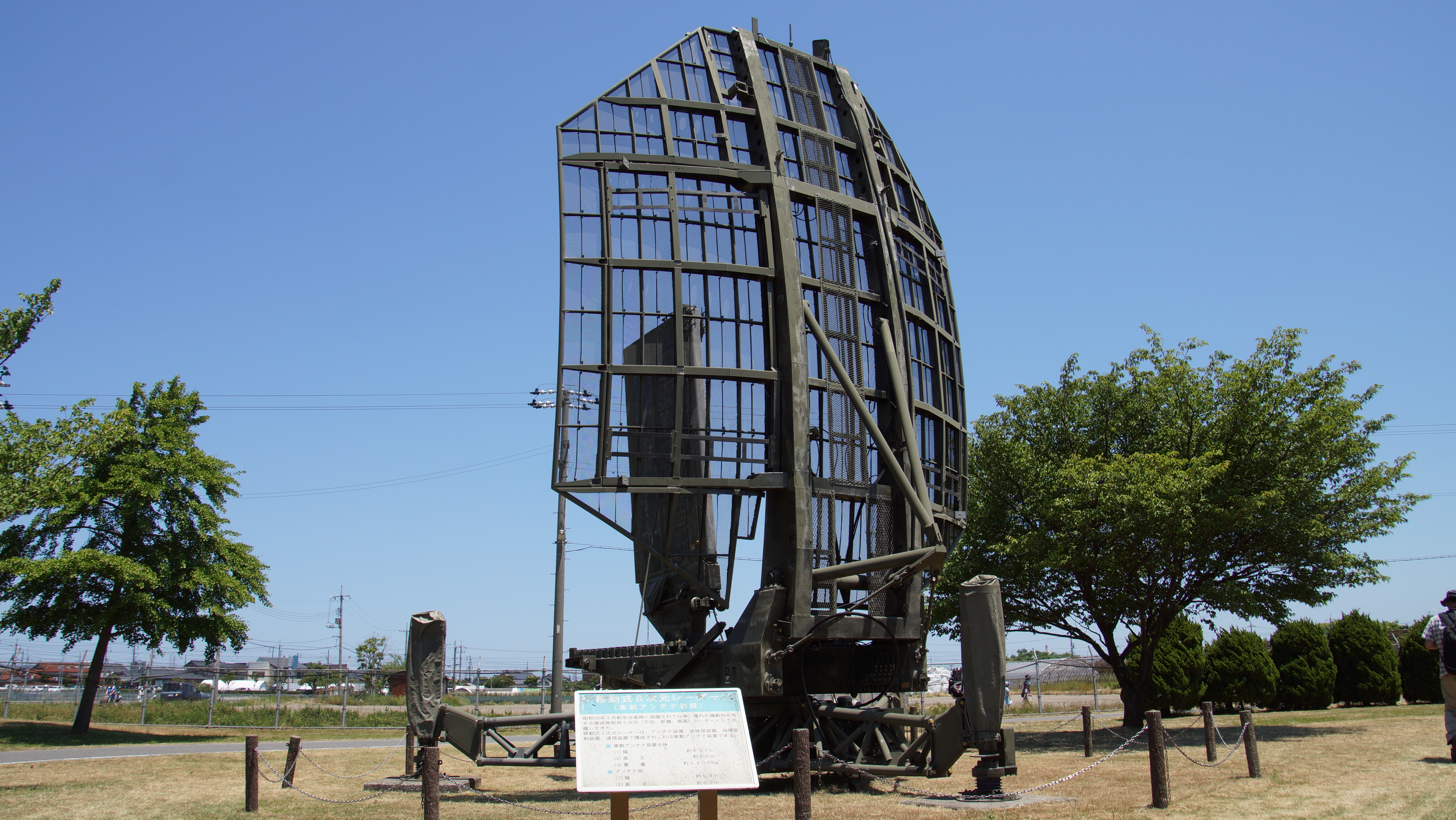 航空自衛隊 移動式三次元レーダー装置J/TPS-101（NAS-79空中線装置） 左後部。2017年5月28日 美保基地にて。